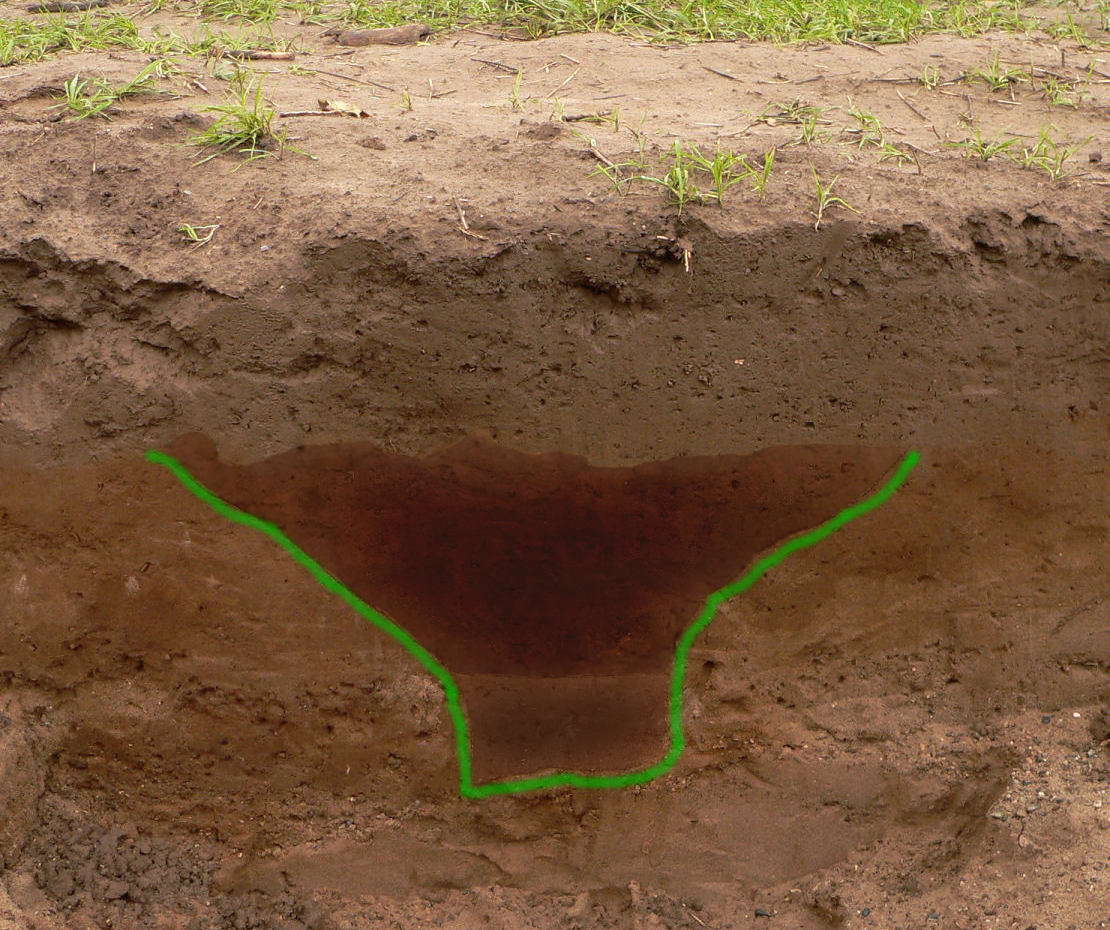 Römisches Marschlager von Wilkenburg, Grabungsschnitt durch den Spitzgraben mit angezeichnetem Profil und fotogrfaisch mit Fotoprogramm nachträglich eingefärbter Innenraum des Grabens, der später verfüllt wurde. Unten das Reinigungsgräbchen der Römer.